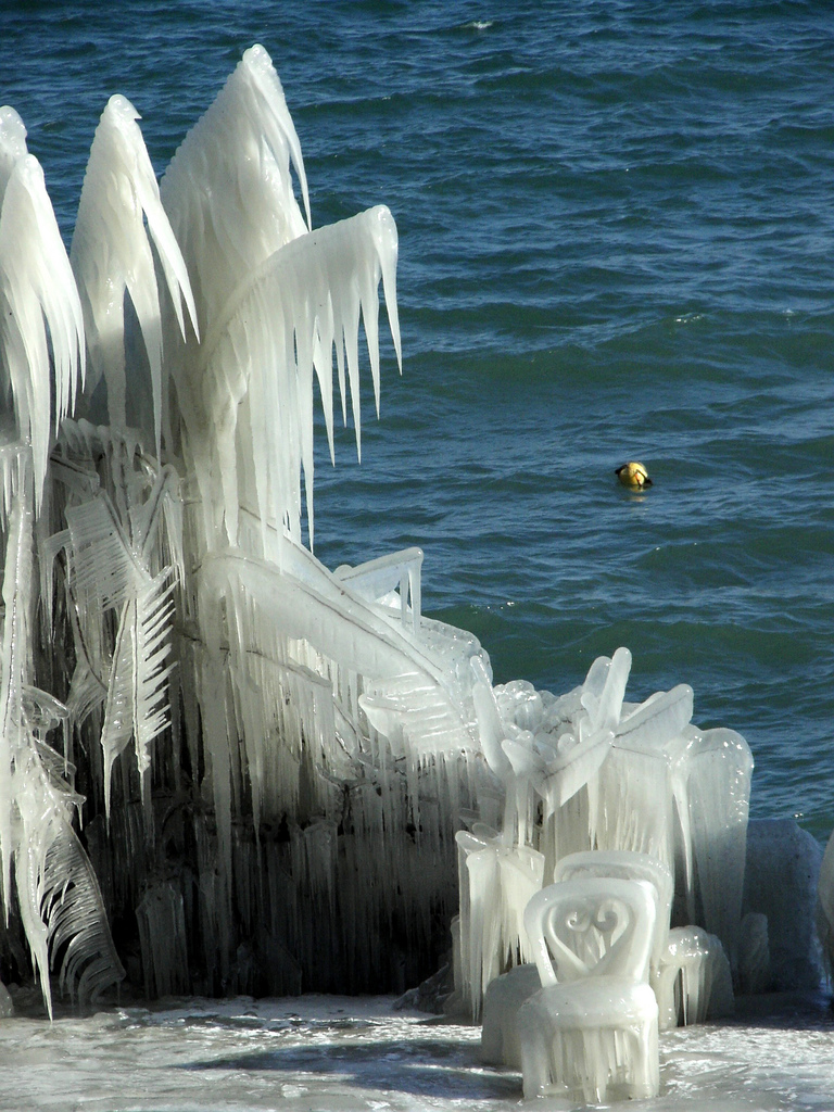 Versoix on ice 2